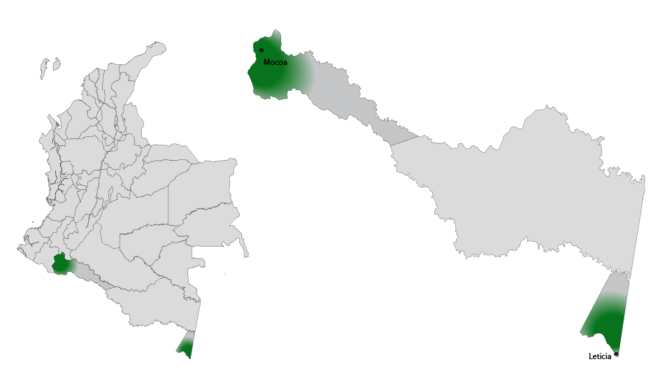 Eje musical de Frontera - Amazónico